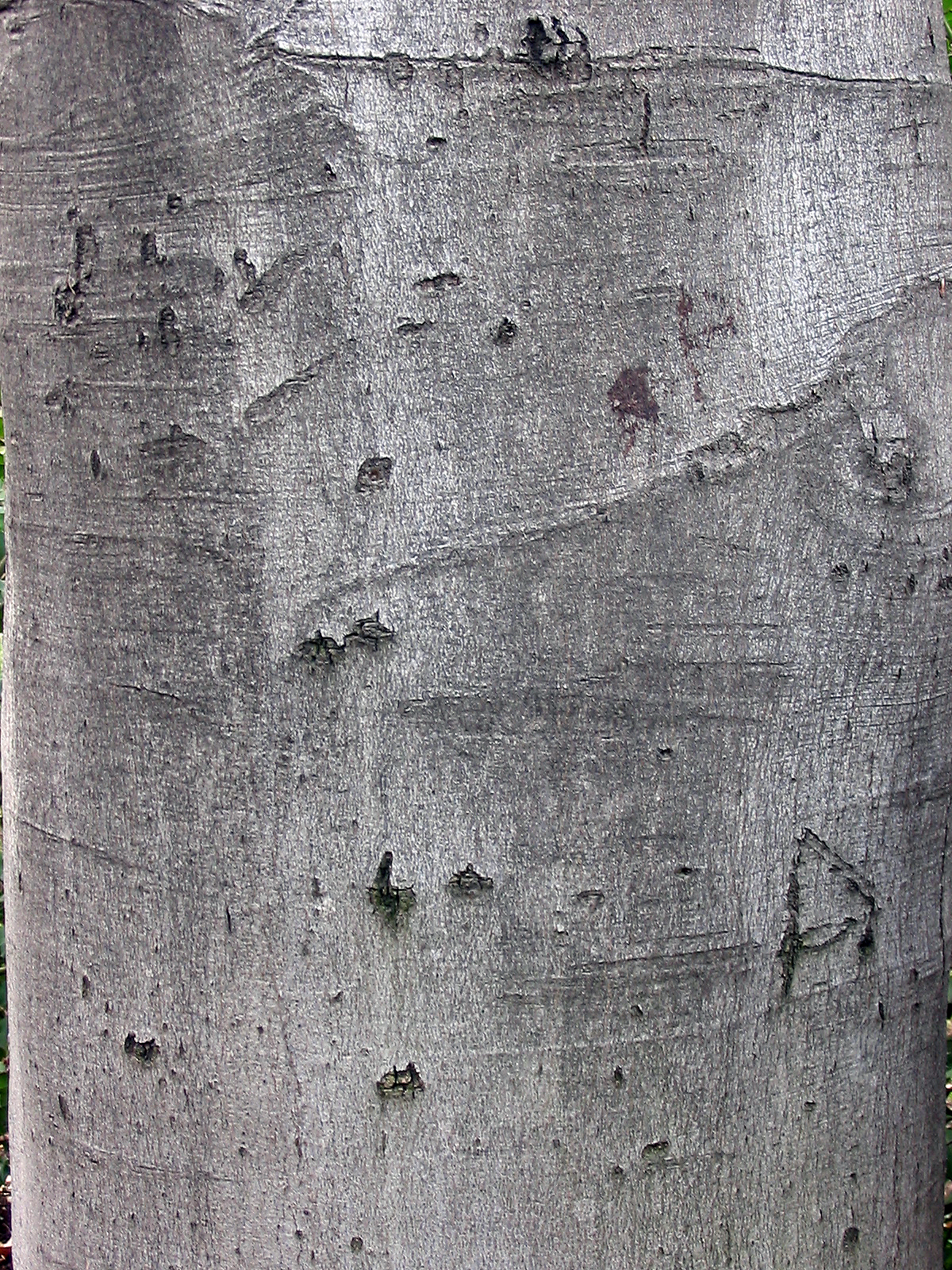 Fotografía de Pablo Alberto Salguero Quiles de la textura del tronco de Fagus sylvatica de las Fagaceae, se le supone nativo del Centro y oeste de Europa. En España se le llama Haya. La fotografía está realizada en el Real Jardín Botánico de Madrid. España. El 4 de Abril de 2007.